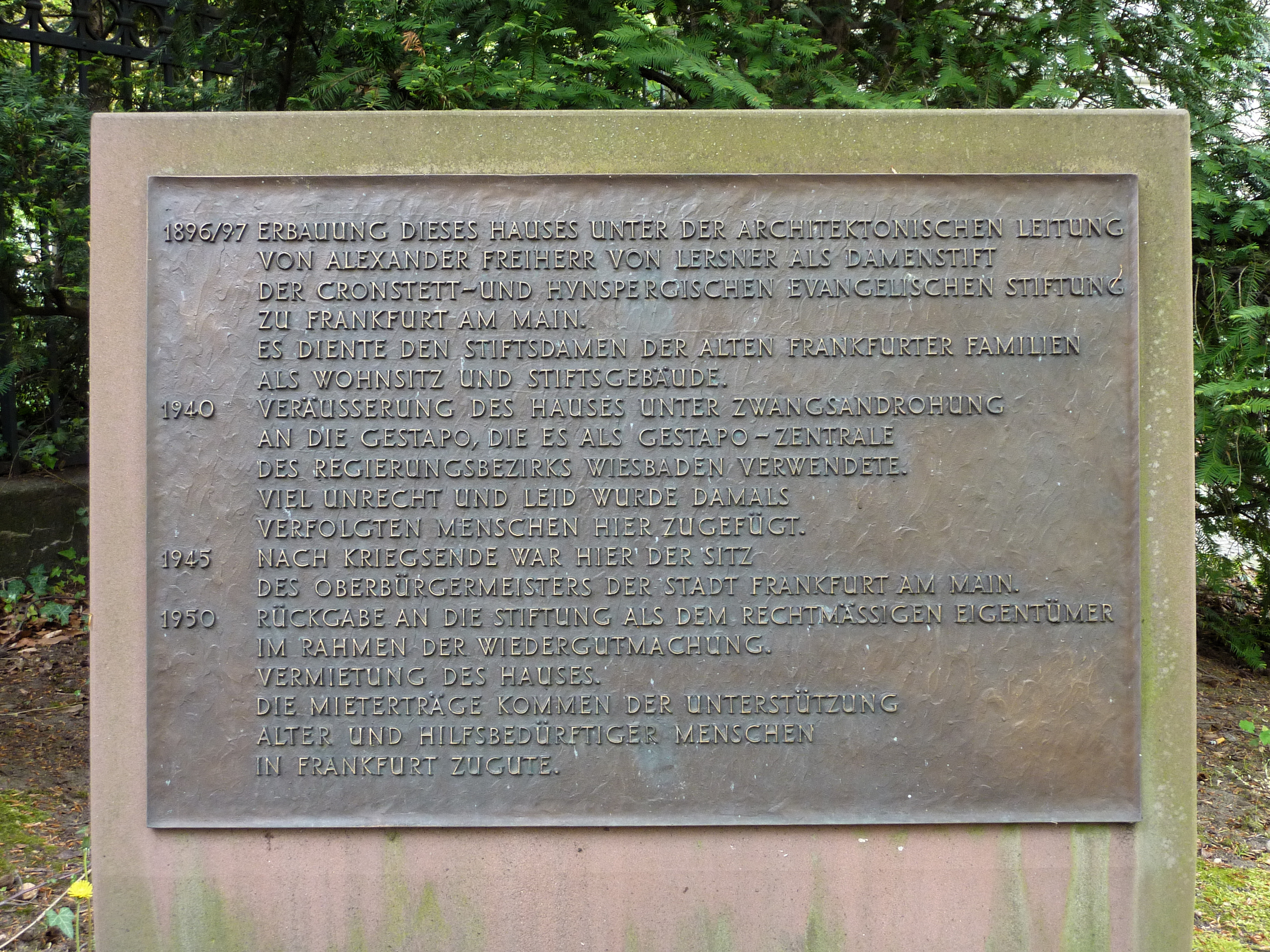 Gedenktafel am Haus Lindenstraße 27 im Stadtteil Westend-Süd in Frankfurt am Main mit Informationen zu dessen Geschichte. Enthüllt am 01. Januar 1987. Sandsteinsockel mit Messingtafel. Inschrift der Gedenktafel: „1896/97 – Erbauung dieses Hauses unter der architektonischen Leitung von Alexander Freiherr von Lersner als Damenstift der Cronstetten- und Hynspergischen Evangelischen Stiftung zu Frankfurt am Main. Es diente den Stiftsdamen der alten Frankfurter Familien als Wohnsitz und Stiftsgebäude. 1940 – Veräußerung des Hauses unter Zwangsandrohung an die Gestapo, die es als Gestapo-Zentrale des Regierungsbezirks Wiesbaden verwendete. Viel Unrecht und Leid wurde damals verfolgten Menschen hier zugefügt. 1945 – Nach Kriegsende war hier der Sitz des Oberbürgermeisters der Stadt Frankfurt am Main. 1950 – Rückgabe an die Stiftung als dem rechtmäßigen Eigentümer im Rahmen der Wiedergutmachung. Vermietung des Hauses. Die Mieterträge kommen der Unterstützung alter und hilfsbedürftiger Menschen in Frankfurt zugute.“